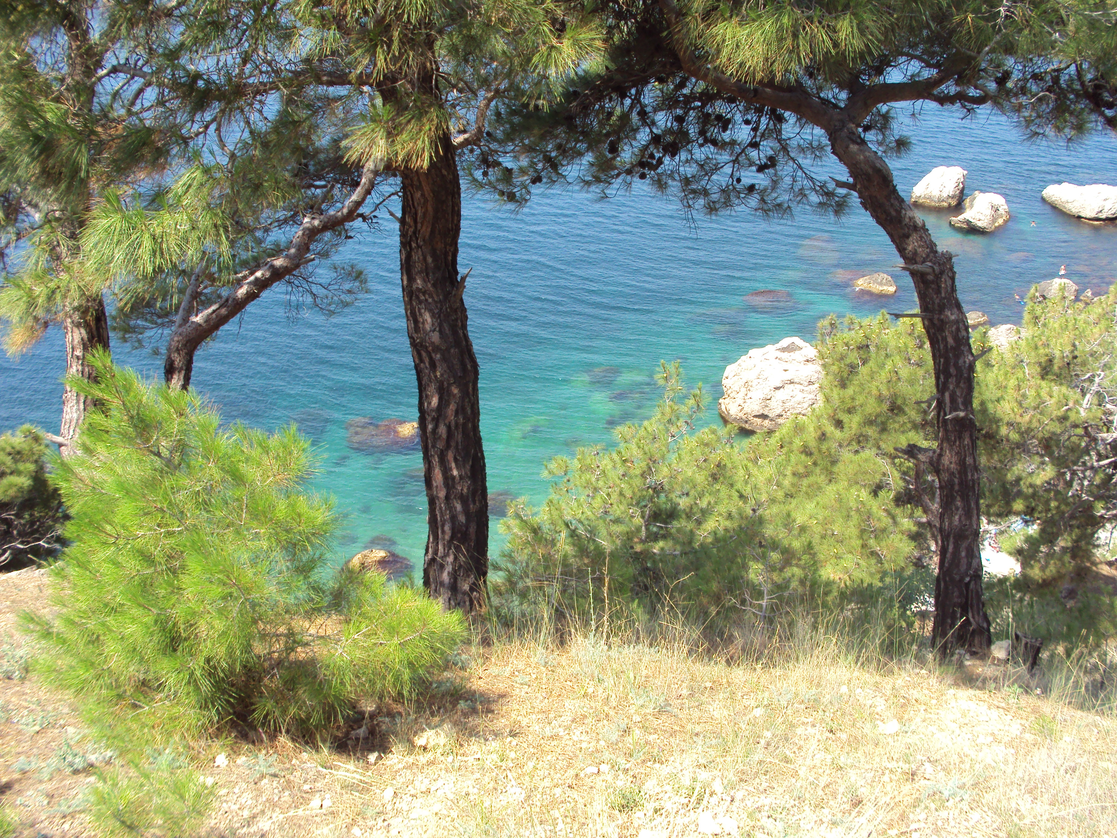 Сосны на мысе Айя